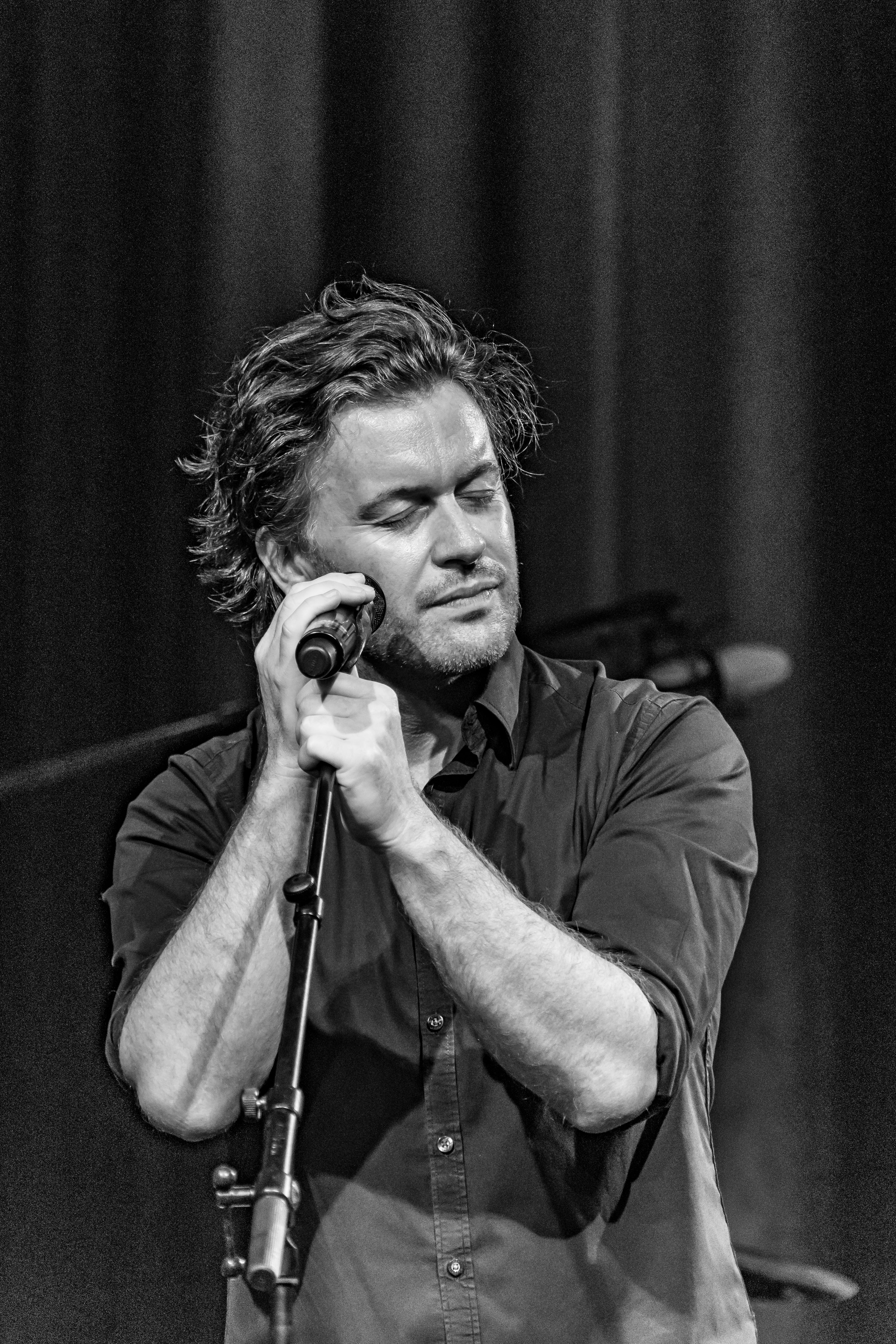 Uwe Schmidt - Live in Spielberg